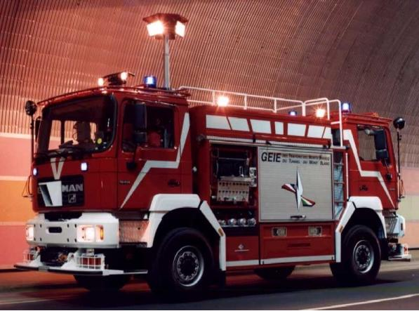 Tunnellöschfahrzeug Janus4000 BAI